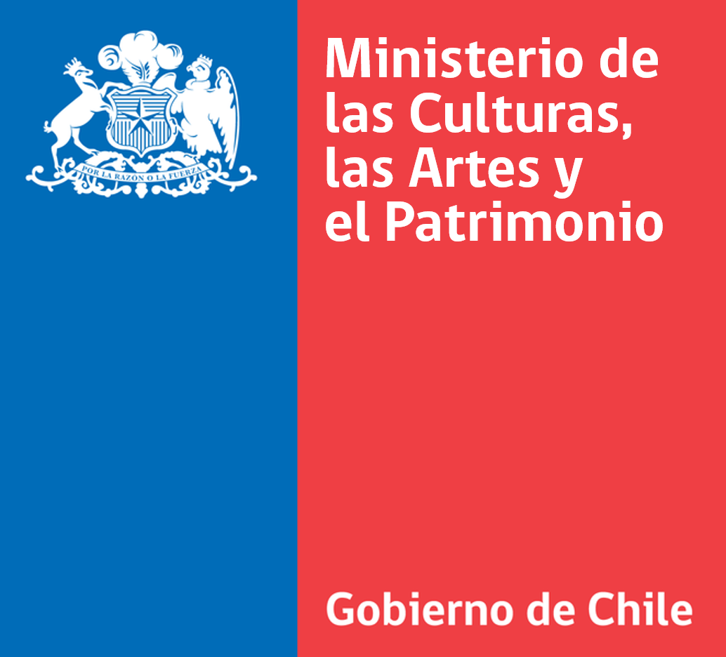 Logo del Ministerio de las Culturas, las Artes y el Patrimonio.